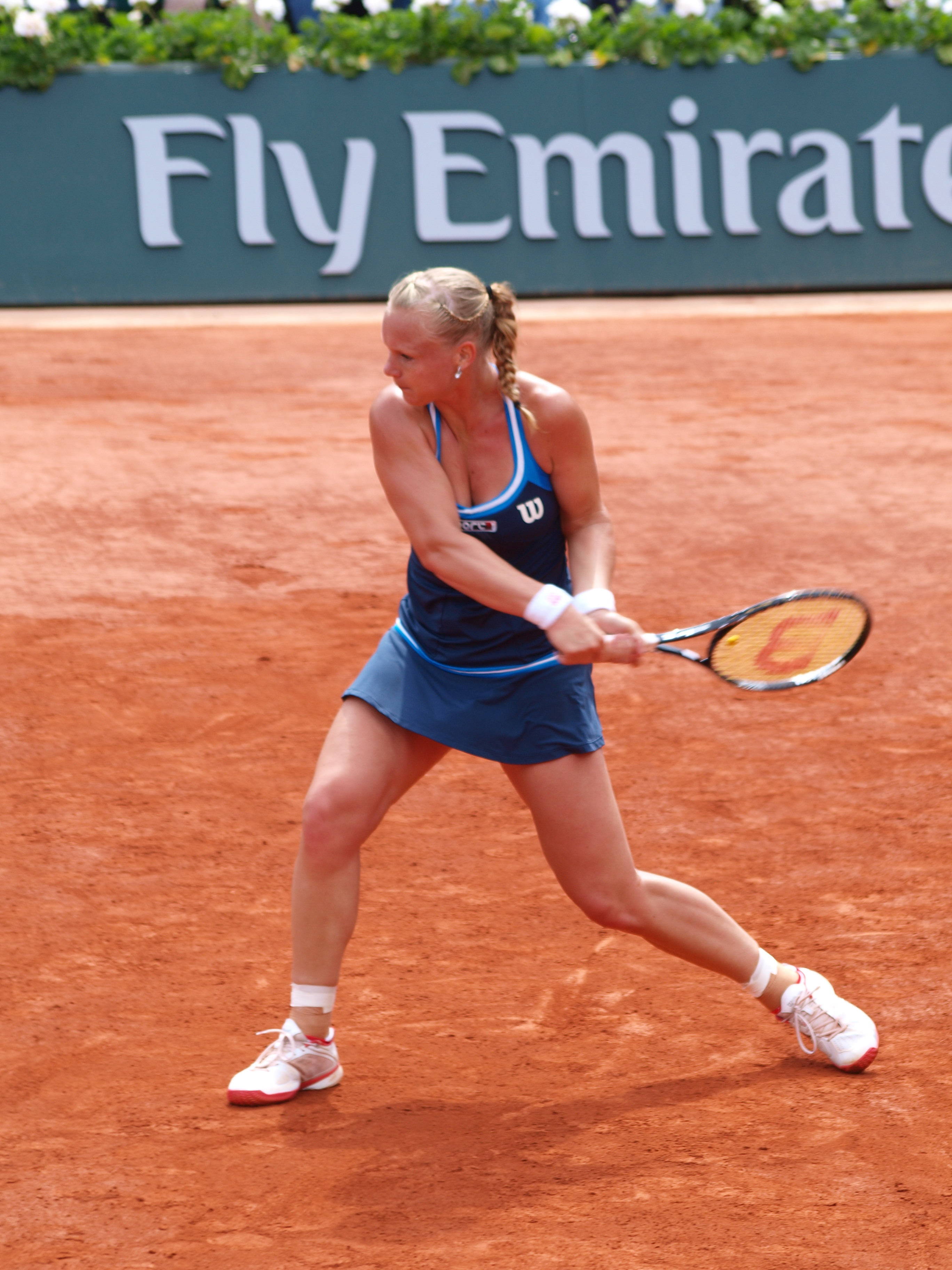 Internationaux de France de tennis, le 2 juin 2014, sur le court Philippe Chatrier : Kiki Bertens